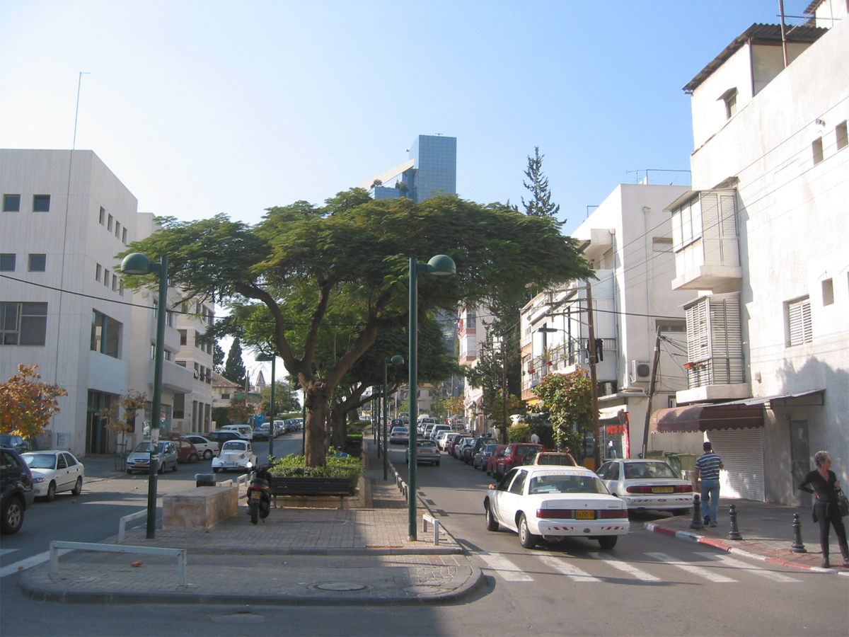 Yehudit avenue, Tel Aviv